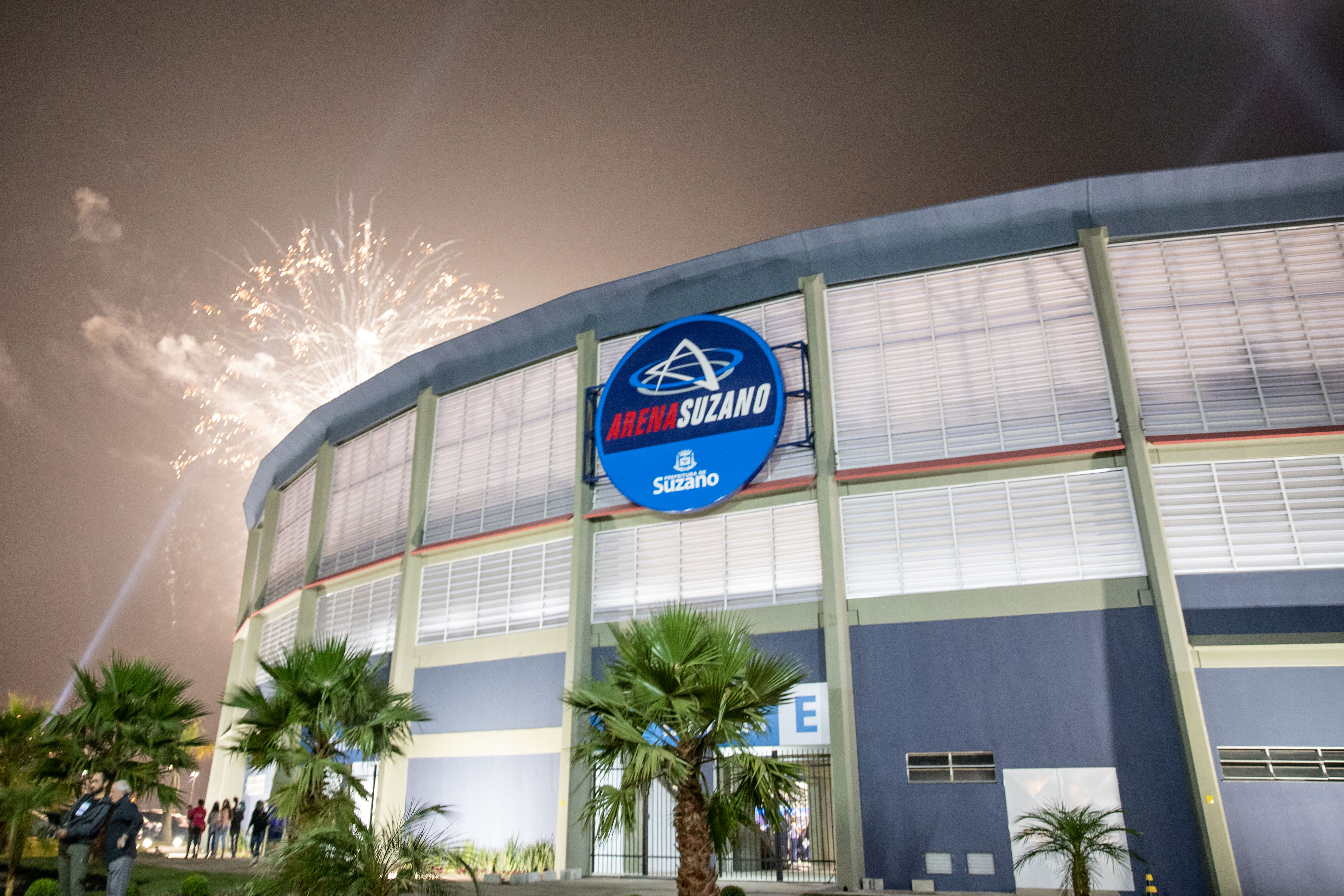 O governador Márcio França, participa da inauguração, nesta quinta-feira, 5 de julho, da Arena Multiuso do Parque Municipal Max Feffer.Local: Suzano/SP Data: 05/07/2018. Foto: Governo do Estado de São Paulo